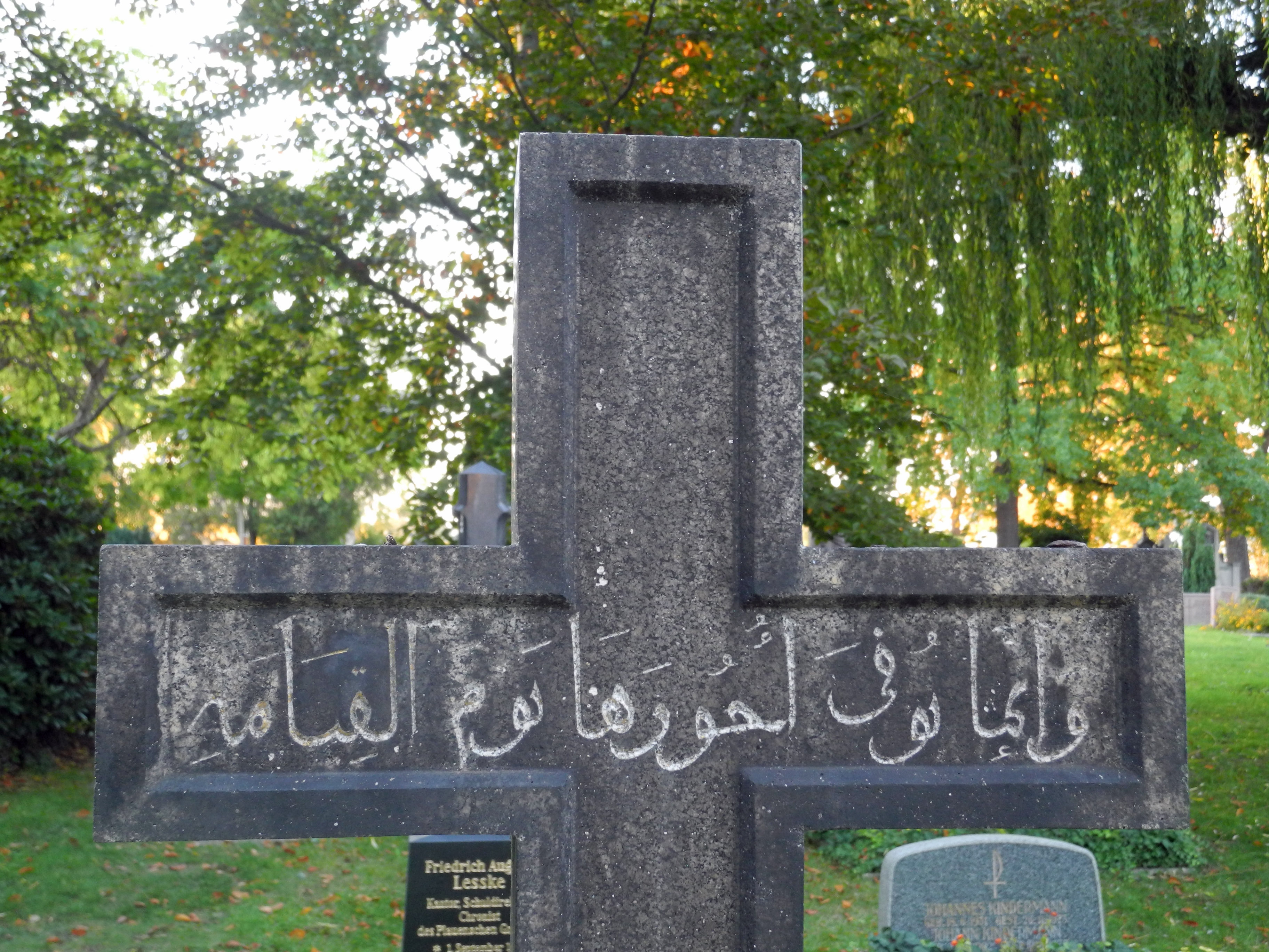 Alter Annenfriedhof in Dresden-Südvorstadt: Grabstätte des Arabisten Carl Heinrich Schier (1802–1869), siehe [1], daher ist das Grabmal mit einer arabischen Beschriftung versehen, und von Emilie Ernestine Schier, geb. Metzger (1824–1854), vermutlich seine Frau oder seine Schwiegertochter. Der arabische Text Wa-innamā yuwaffā uğūrahā yauma l-qiyāma lautet in der Übersetzung Und wahrlich ihm wird sein Lohn am Tag der Auferstehung voll erstattet in Anlehnung an die Sure 3, Vers 185 im Koran: „Jeder wird den Tod erleiden. Euch wird euer Lohn am Tag der Auferstehung voll erstattet. Wer vom Feuer weggerückt und ins Paradies geführt wird, der hat das Ziel erreicht. Das diesseitige Leben ist ja nur eine betörende Nutznießung.“ (Übersetzung: Khoury). Da sich der Spruch offensichtlich auf die Frau Emilie Ernestine Schier bezieht, könnte die Übersetzung aber auch lauten Und wahrlich ihr wird ihr Lohn am Tag der Auferstehung voll erstattet.